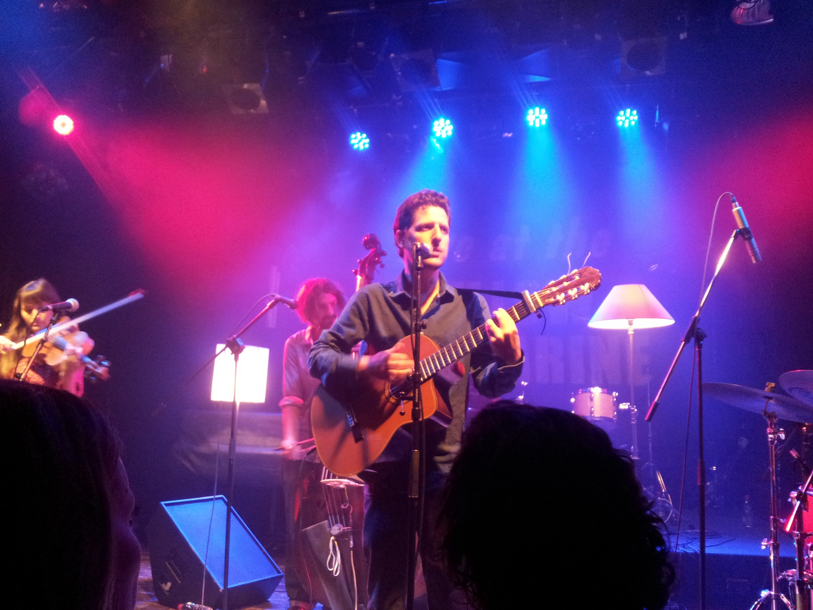 Jerusalem